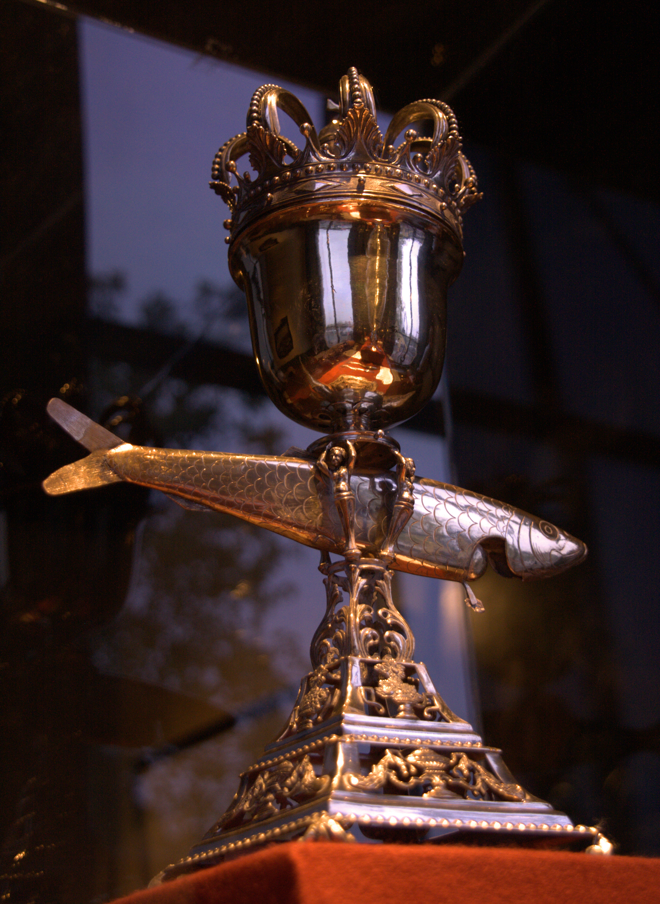 Zilveren haringbeker geschonken in 1883 aan Pieter Karel Drossaart bij diens jubileum. Inv.nr. 2664 Visserijmuseum - Zilveren haringbeker geschonken in 1883 aan Pieter Karel Drossaart bij diens jubileum, tevens afscheid als burgemeester van Vlaardingen